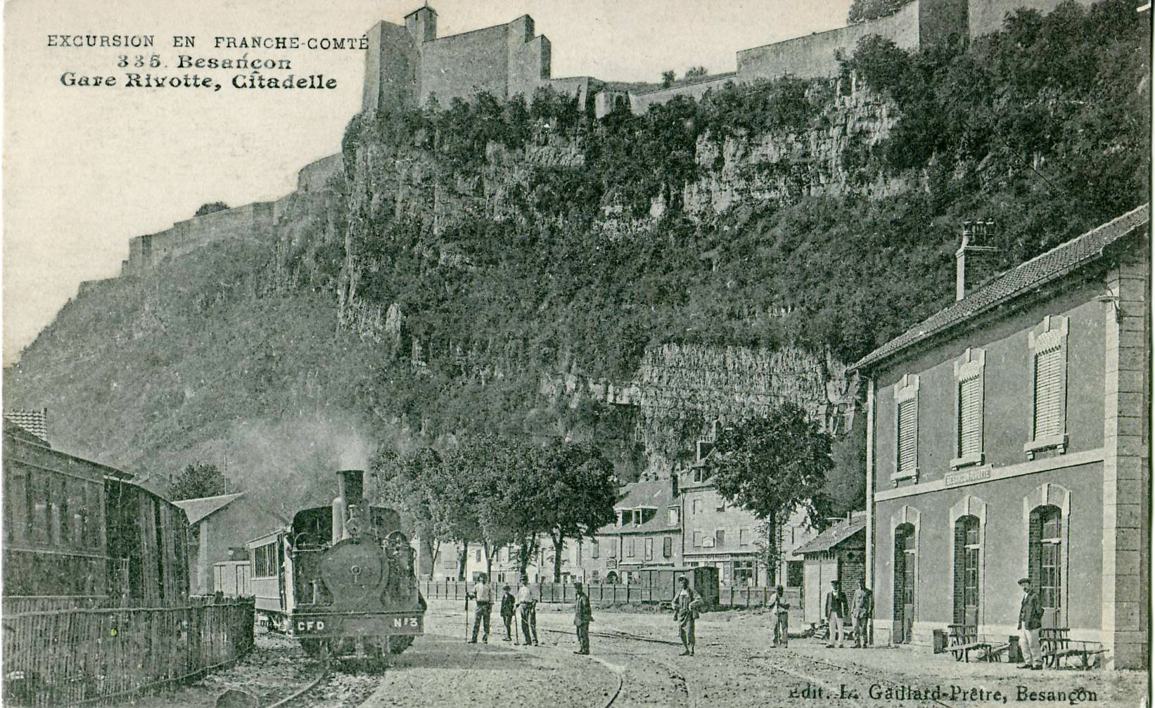 Carte postale ancienne éditée par Gaillard-Prêtre à Besançon, collection "Excursion en Franche-Comté", n°335Besançon : Gare Rivotte - Citadelle